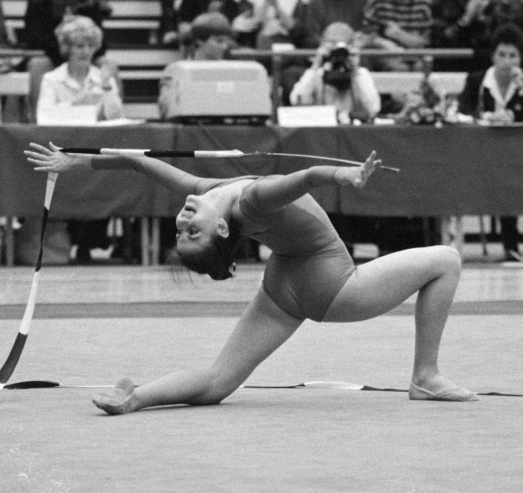 Europese kampioenschappen Ritmische Gymnastiek in Amsterdam, Europees kampioen werd de Bulgaarse Raeva